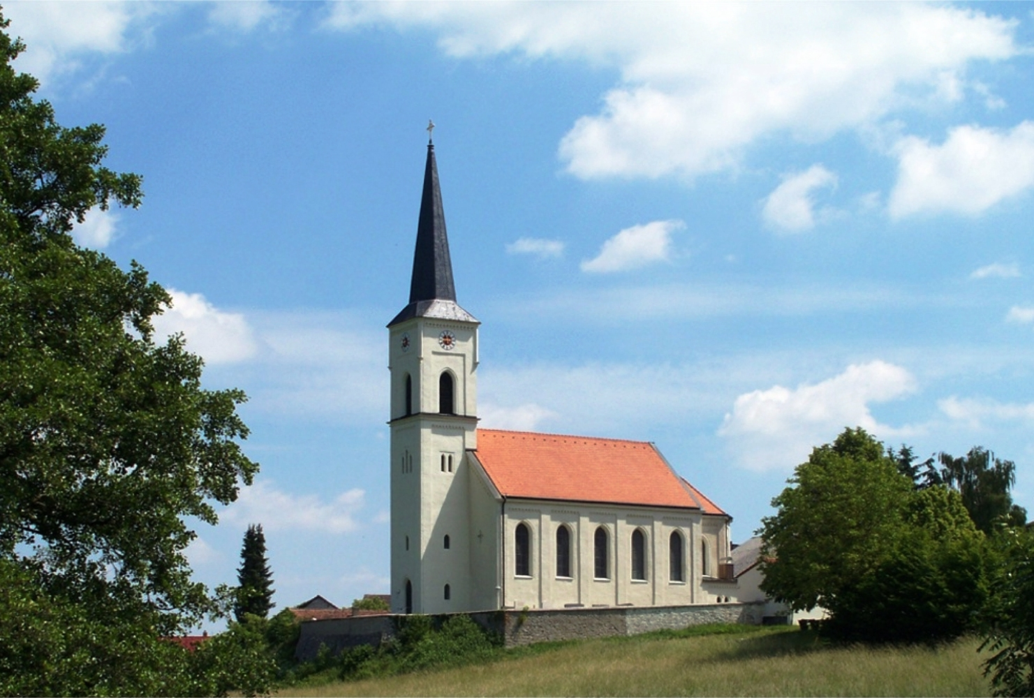 Die neugotische Dorfkirche Mariä Opferung in Kirchanhausen, Bayern, Deutschland.